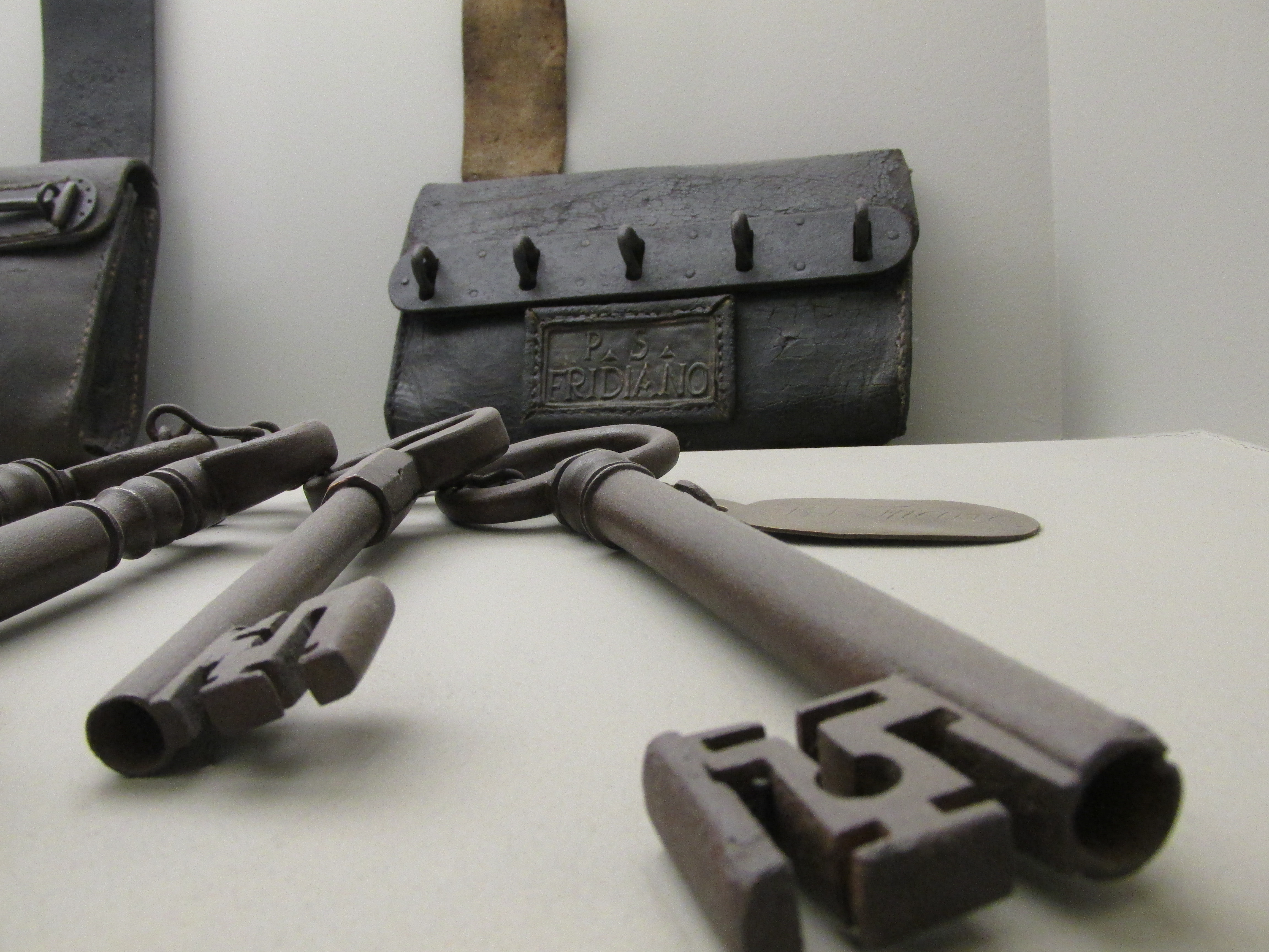 Chiavi di Porta San Frediano (già Fridiano)